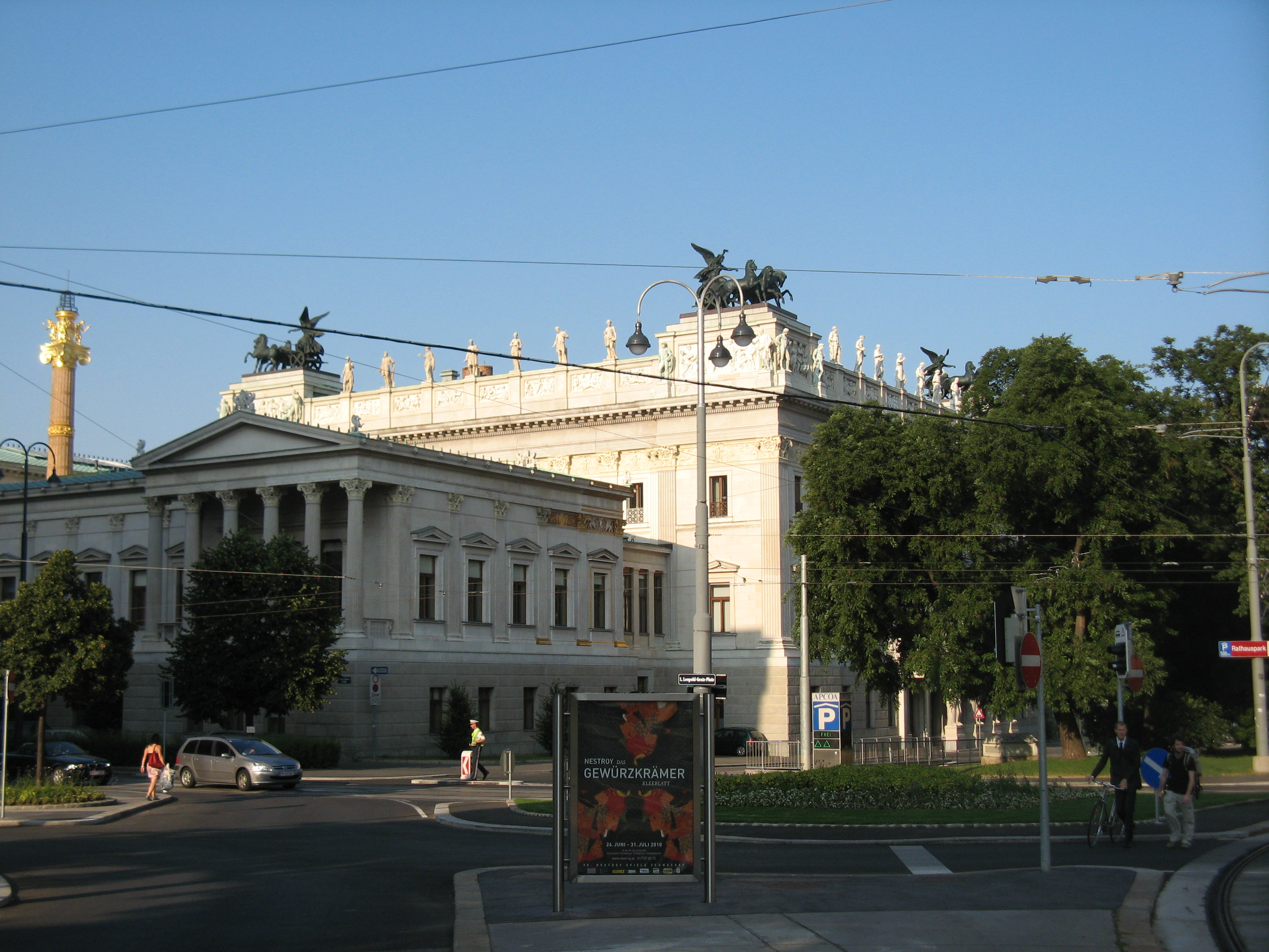 Schmerlingplatz mit Blick auf das Parlament, Wien-Innere Stadt